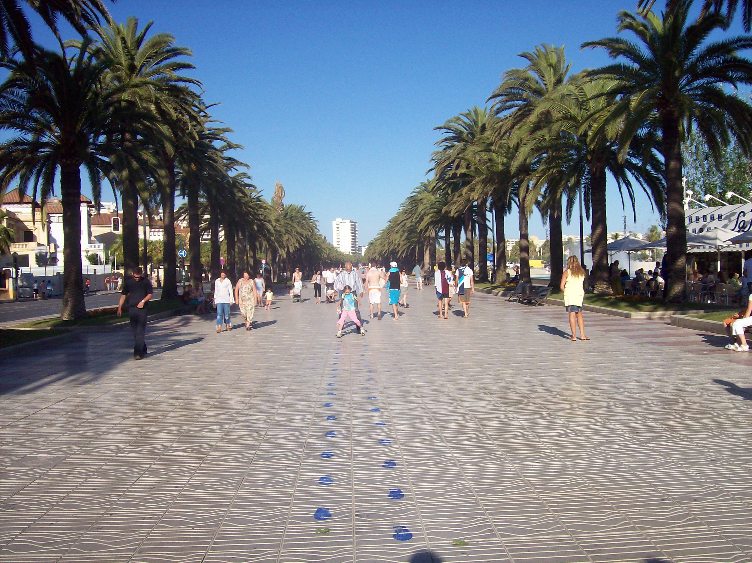 Salou city